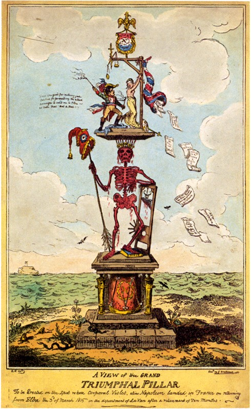 Wohl nach der Vorlage von James Gillrays "Designe for the Naval Pillar" entstandenes Blatt, das ein drastisches Bild des Schreckens nach Napoleons erfolgreicher Rückkehr aus der Verbannung auf der Insel Elba malt. Auf der obersten Plattform der Triumphsäule peitscht Napoleon eine halbnackte "Marianne" aus, die an einen Galgen gefesselt ist.